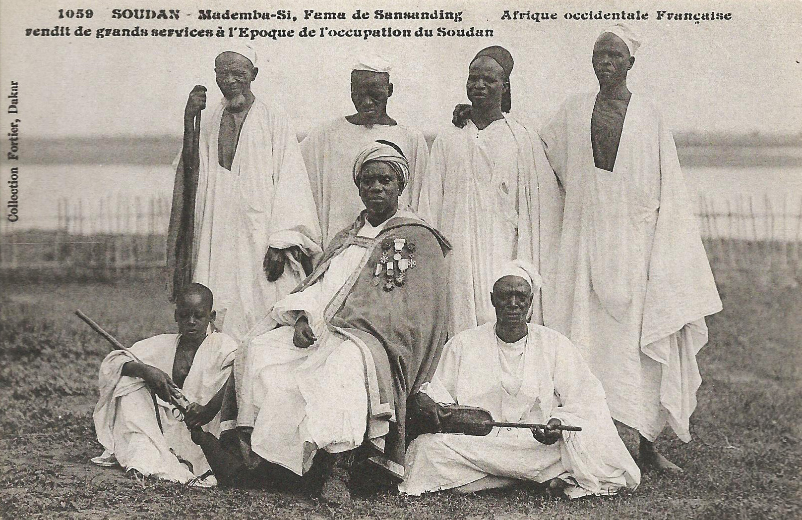 François-Edmond Fortier, Mademba-Si, Fama de Sansanding, rendit de grands services à l'époque de l'occupation du Soudan. Afrique Occidentale française- Soudan.